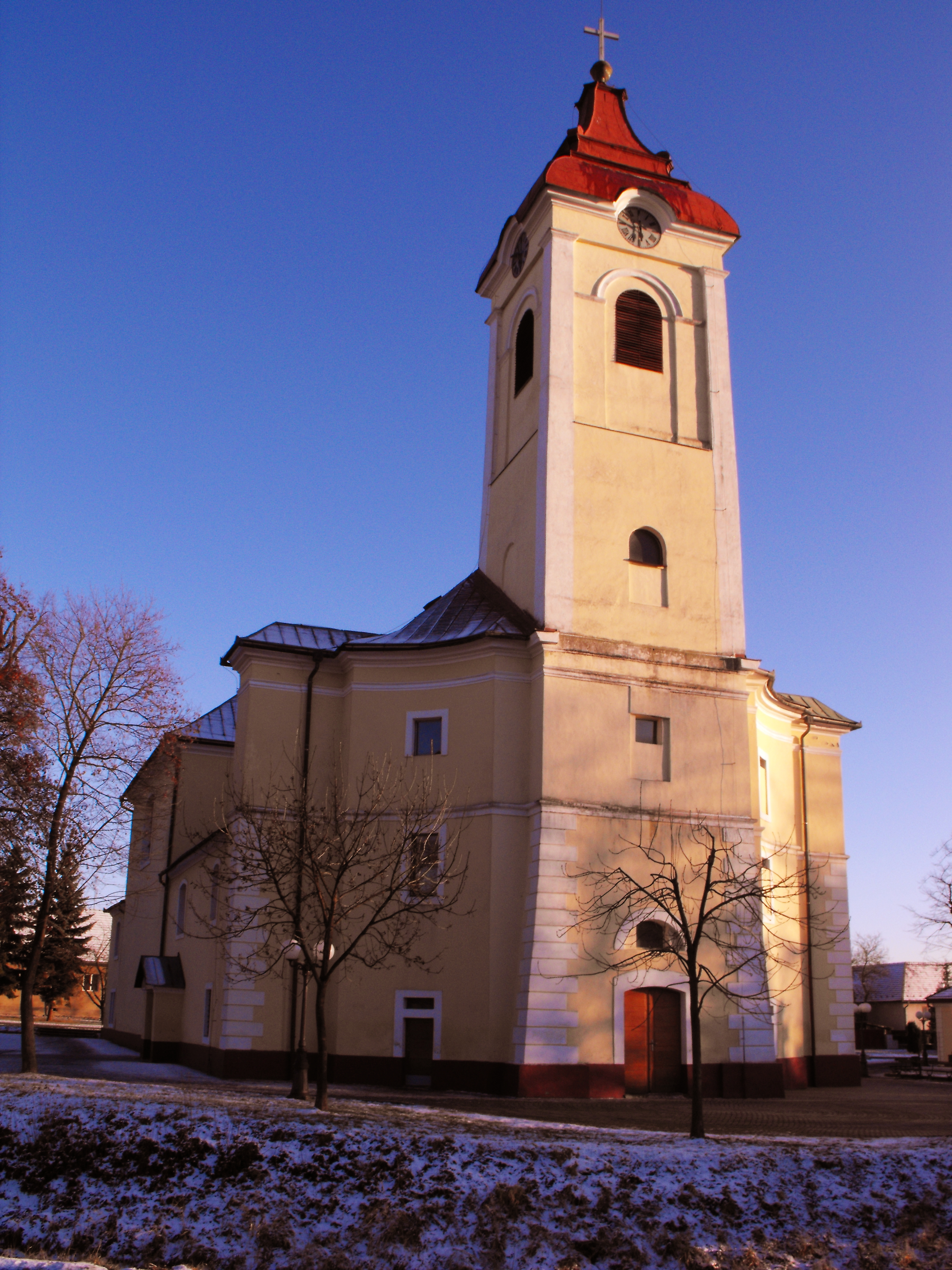 Fronto de la preĝejo de sankta Francisko el Asizo en Detva, Slovakio. Antaŭe estas la riverfluejo de Rivereto Detva.